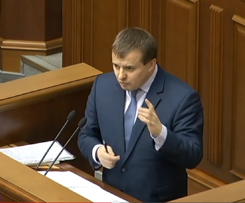 Володимир Васильович Демчишин — чинний міністр енергетики та вугільної промисловості України (другий уряд Арсенія Яценюка).